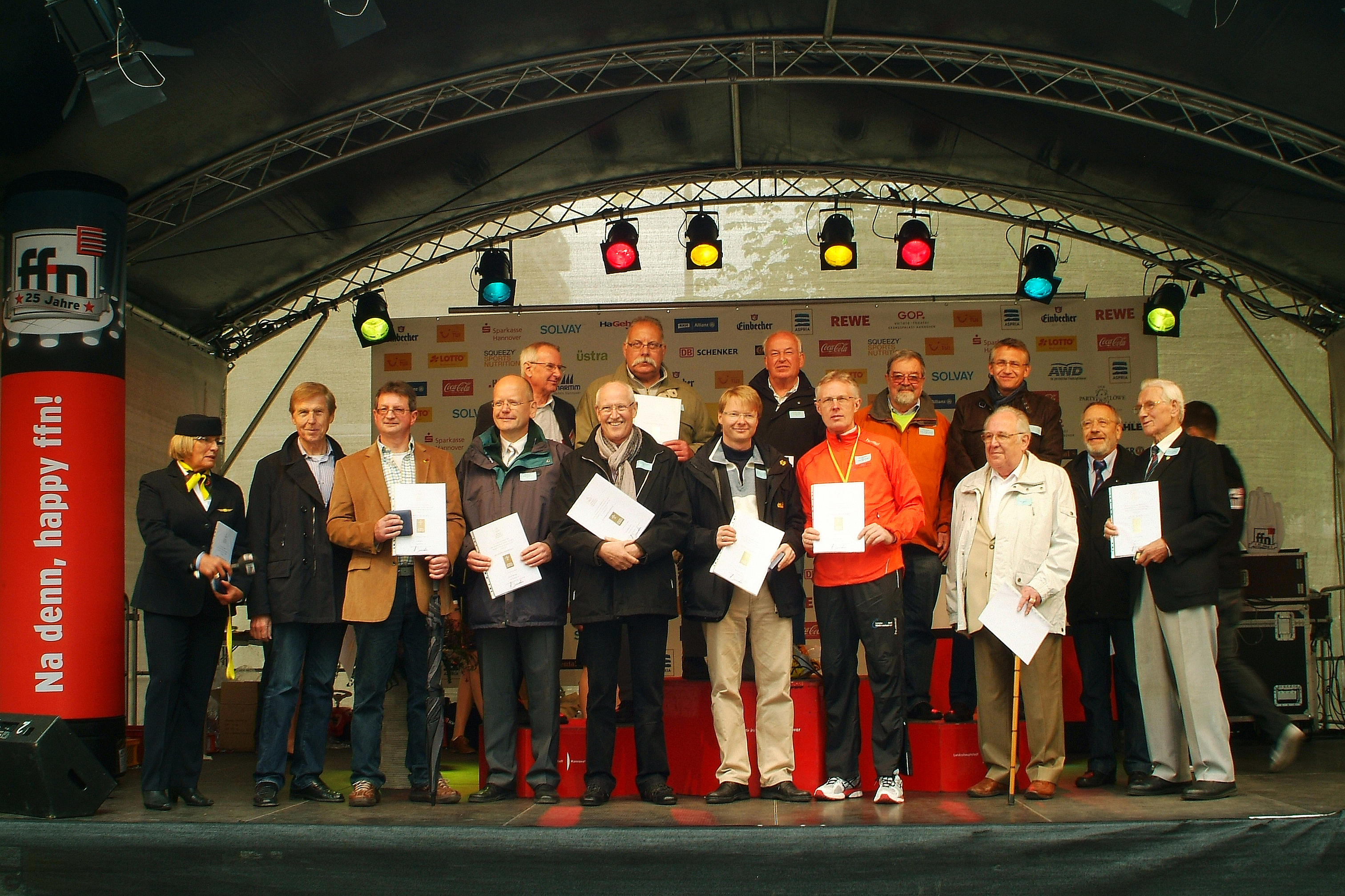 Auszeichnungen der Deutschen Olympischen Gesellschaft (DOG), Zweigstelle Hannover, für langjährige Mitglieder auf der Bühne von Radio ffn während des TUI Marathons Hannover 2012. Personen auf dem Foto von links nach rechts (in Klammern: Mitgliedschaft in Jahren): Rita Girschikowsky / Niedersächsischer Leichtathletik Verband (60); Dr. Horst Meyer (30); Reiner Schmidt / MTV Eintracht, Celle (60); Dr. Dag Danzglock / Deutscher Ruderverband (60); Gerhard Reuse als Vertreter der DOG, Zweigstelle Hannover; Wolf Dietmar Kohlstedt / Stadtsportbund Hannover (60); Karl Heinz Seemann / Hannoverscher Kanu Club (60); Dr. Ing. Jan Steuer / Kanu Klub Limmer (60); Christian Wolf / TKH Turn Klubb zu Hannover (60); Reinhard Rawe / Landessportbund Niedersachsen (60); Peter Hampe / KLV Kreis Leichtatletik Verband (60); Gerd Lewin / Polizei-Sportverein Hannover (60); Fritz Michler (25); Ernst Zumbach / Deutscher Ruder Club von 1884(60); Hans von Malottki (25)